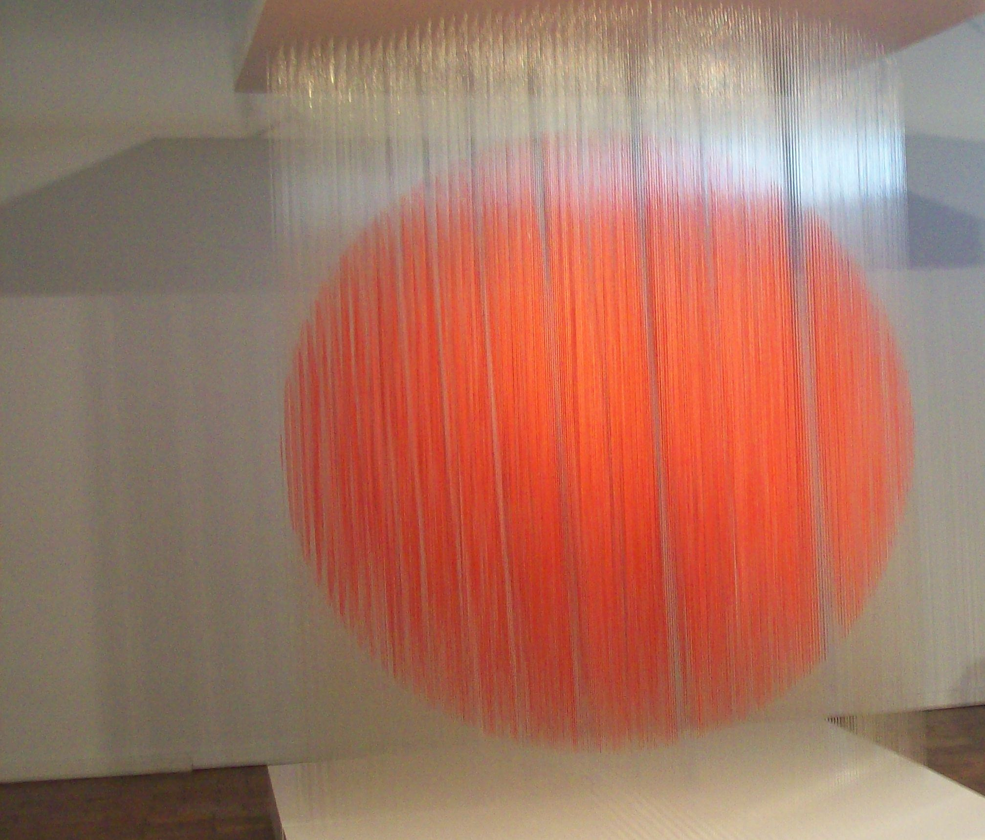 Esta obra es del año 1991.